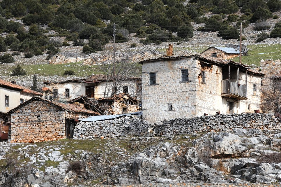 Село Нивици, Долна Преспа, Гърция.